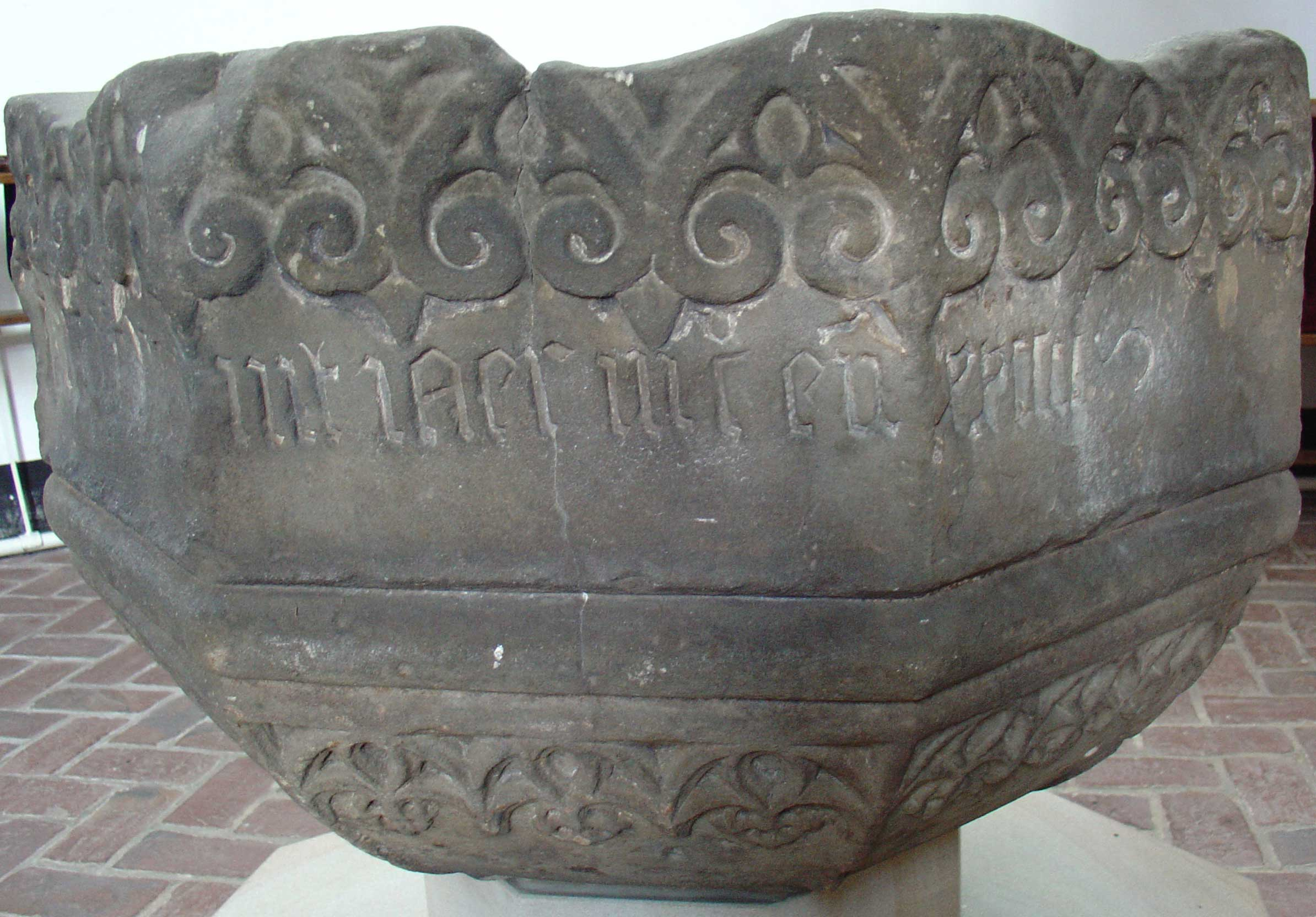 Nicolaaskerk van Onstwedde (doopvont)